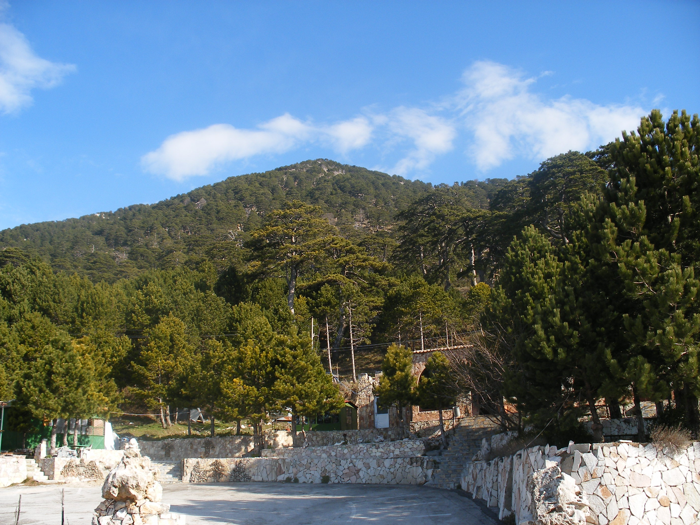 Llogara pass, Albania